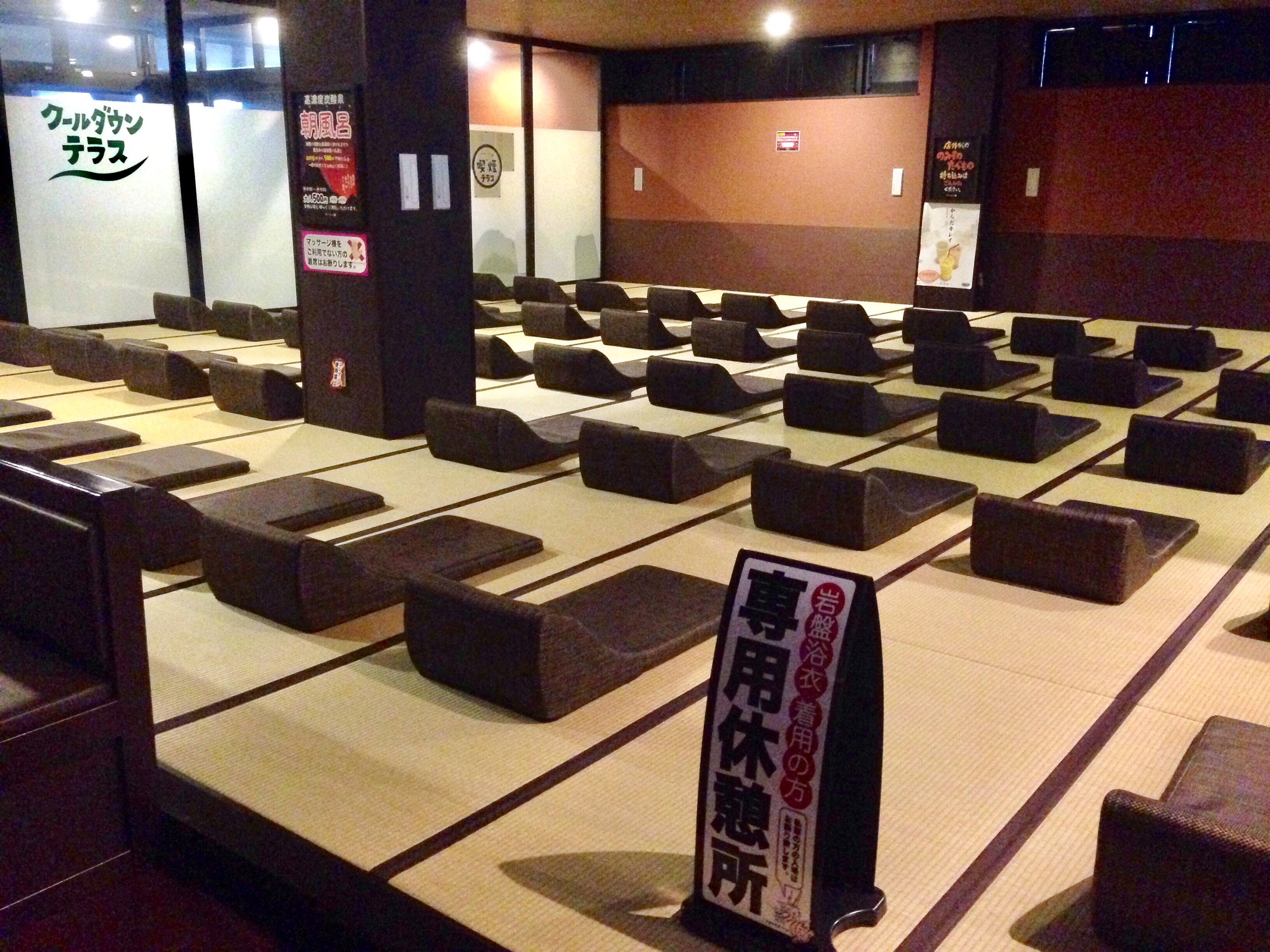 竜泉寺の湯 横濱鶴ヶ峰店の岩盤浴利用者専用休憩ゾーン。奥にはクールダウンテラスがある。